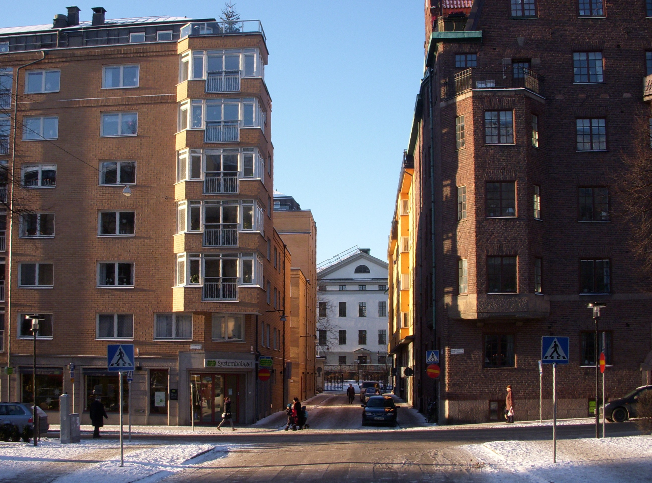 Garvargatan på Kungsholmen i Stockholm, vy från Kungsholmstorg mot väst, Landstingshuset i bakgrunden.